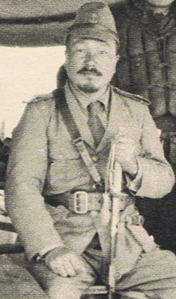 小園安名海軍少佐。上海・公大基地にて。龍驤飛行隊長時代か。 Lieutenant Commander Yasuna Kozono of the Imperial Japanese Navy, at Gongda Airbase, Shanghai, 1937.